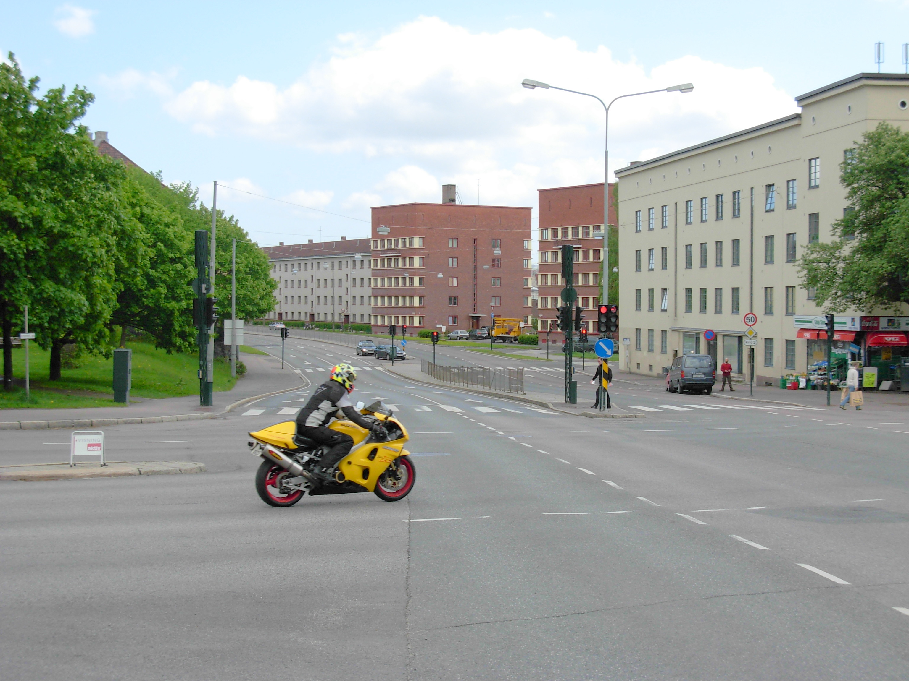 Griffenfeldts gate, seen from Uelands gate, Sagene / Ila, Oslo